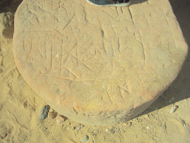 تماثيل لحضارة مروي بالقرب من جبل البركل